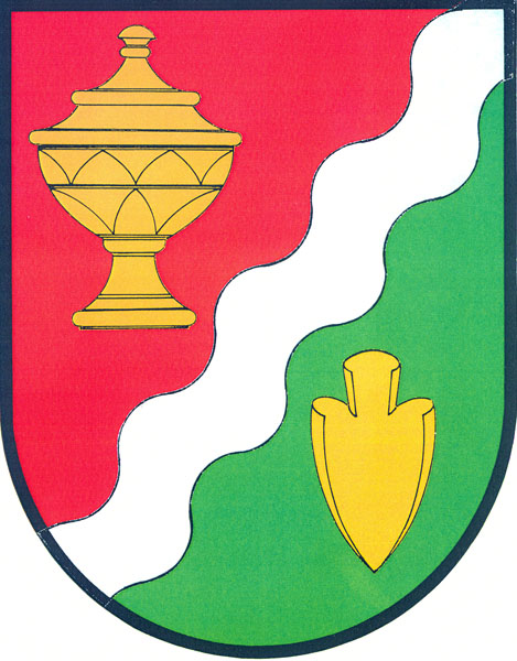 Znak obce Jeřice